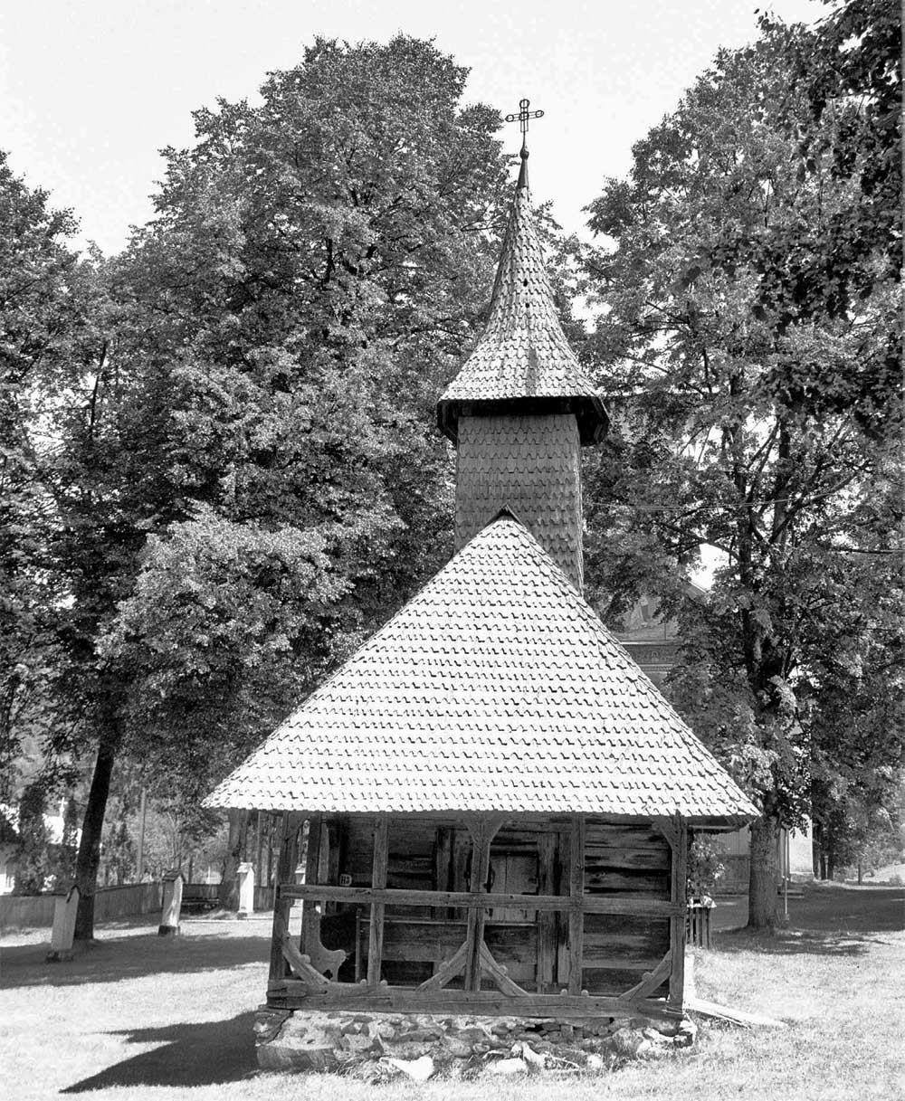 Manastirea Moisei